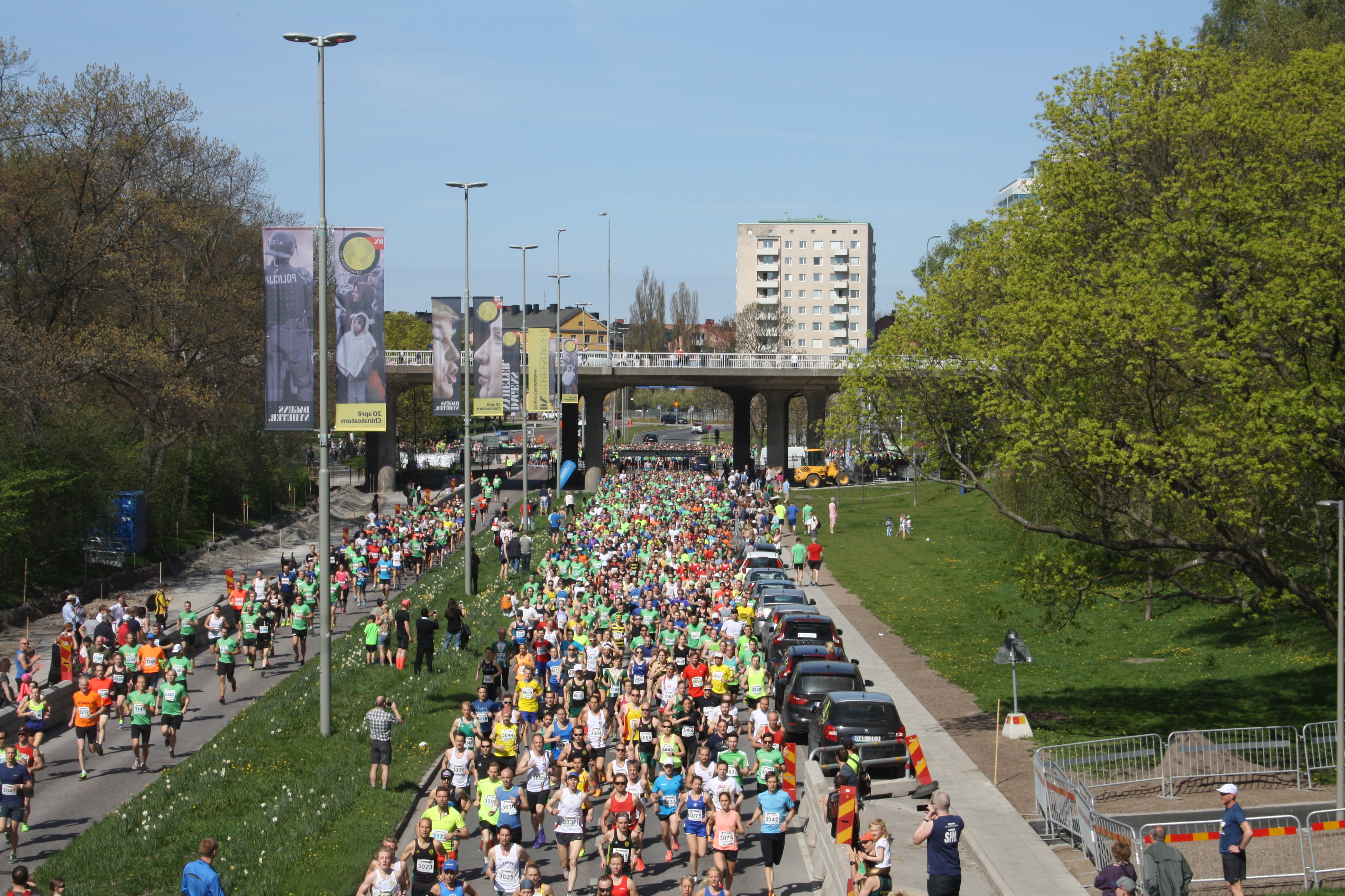 Kungsholmen Runt efter starten